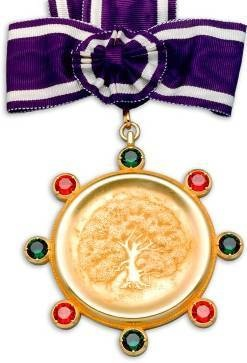 Kyoto Prize(U.S.A.)